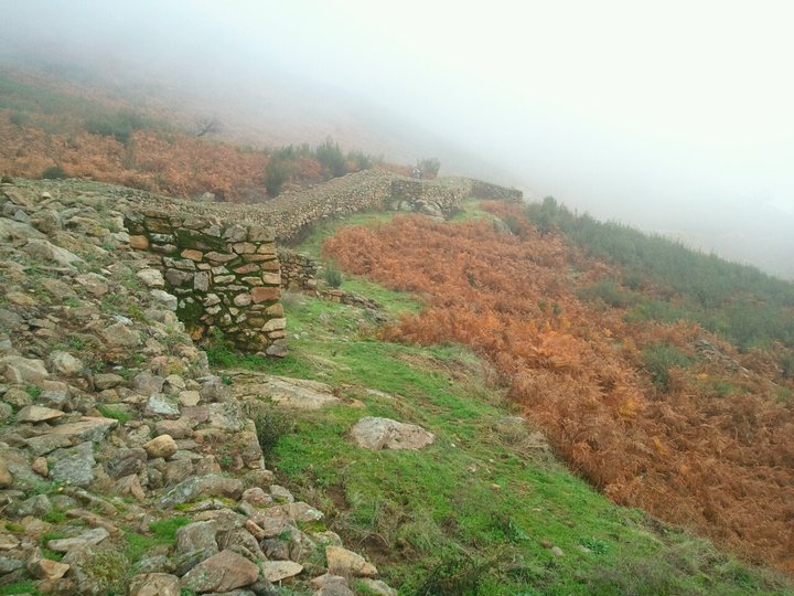 Detalle de la muralla del Castro Celta El Raso